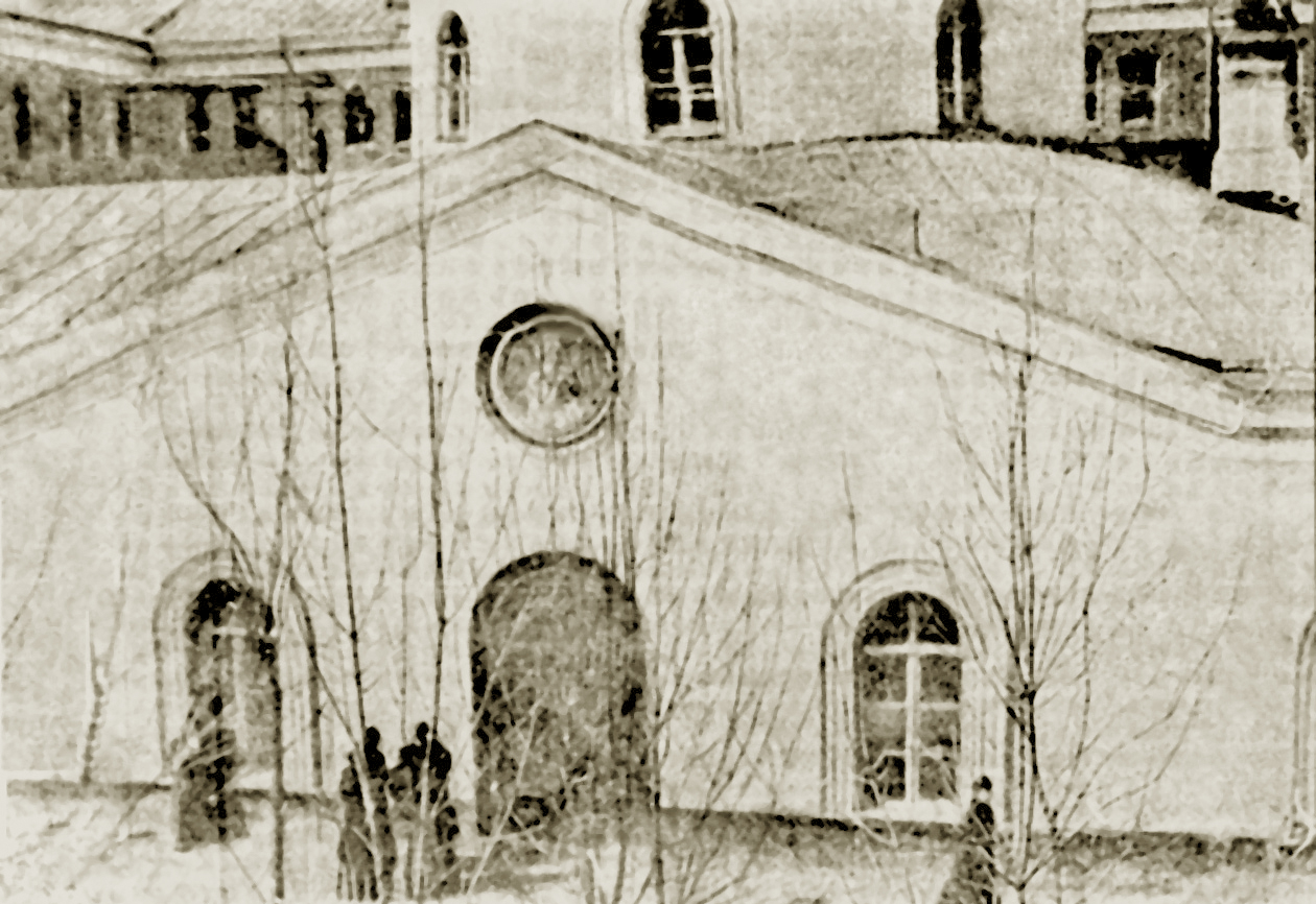 Бутырки. Тюремная церковь, где располагалось ОКБ ОГПУ (вырезка из газеты)